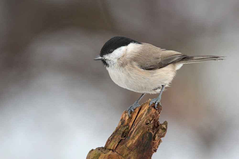 Sumpfmeise in der Nähe des Ilkerbruchs